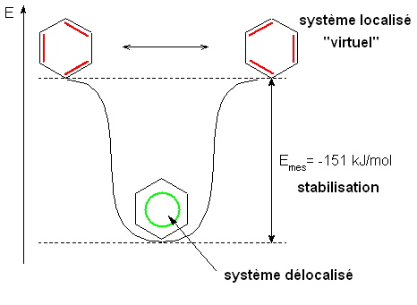 Stabilisation du benzène par mésomérie Quelle: CorelDraw Fotograf oder Zeichner: MarkusZi Andere Versionen: - Lizenzstatus: GNU FDL version française du fichier de commons